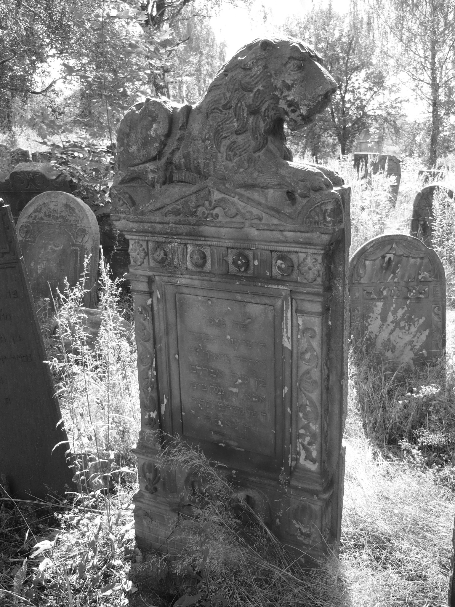 Macewa na cmentarzu żydowskim w Radomsku